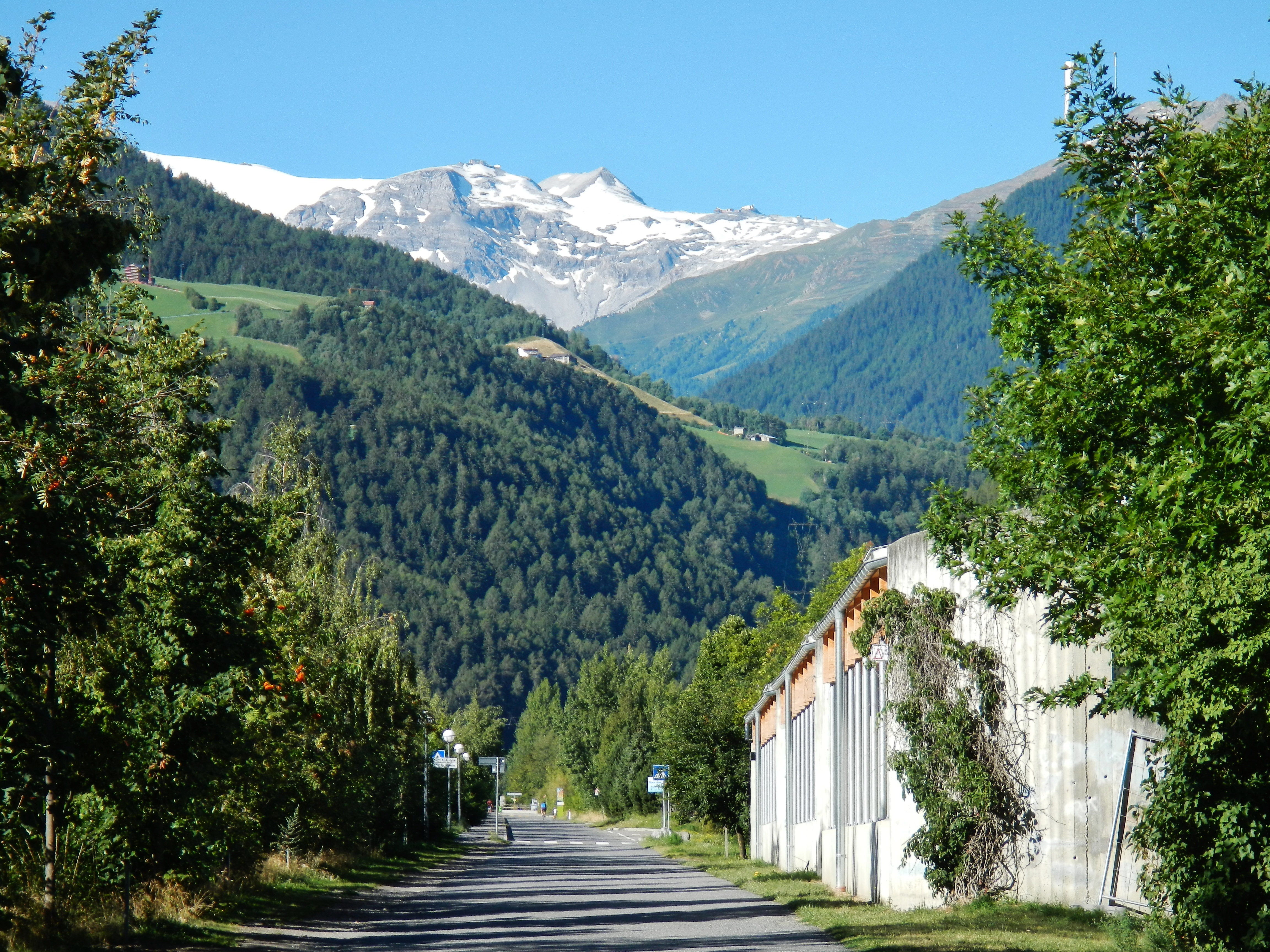 Blick zum Ortler